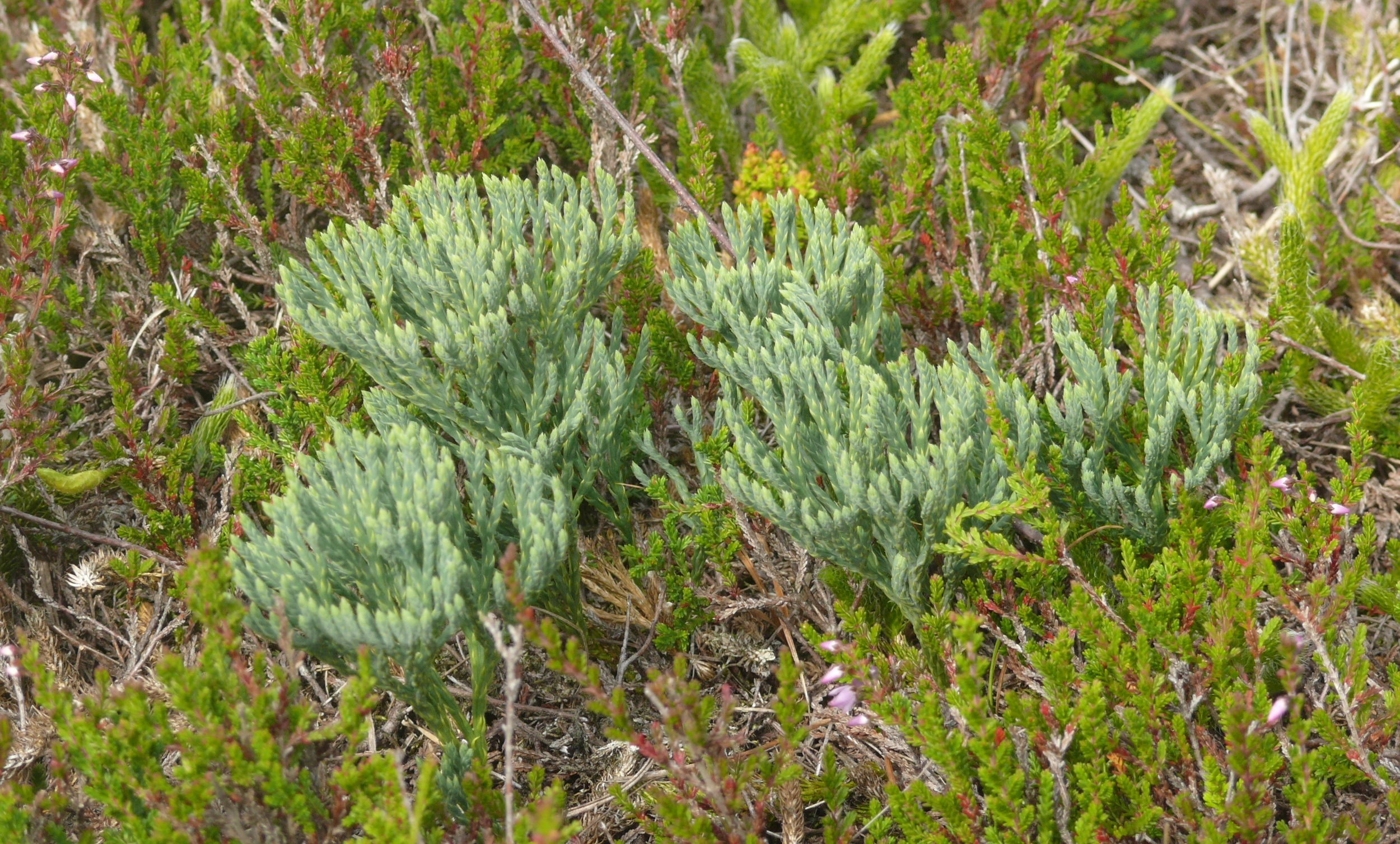 Diphasiastrum tristachyum, Odenwald